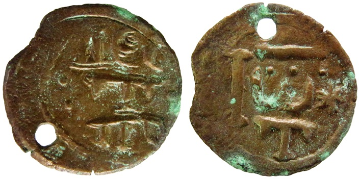 Іван Тертер (1385-1399 рр.), мідна монета. Національний музей історії України.